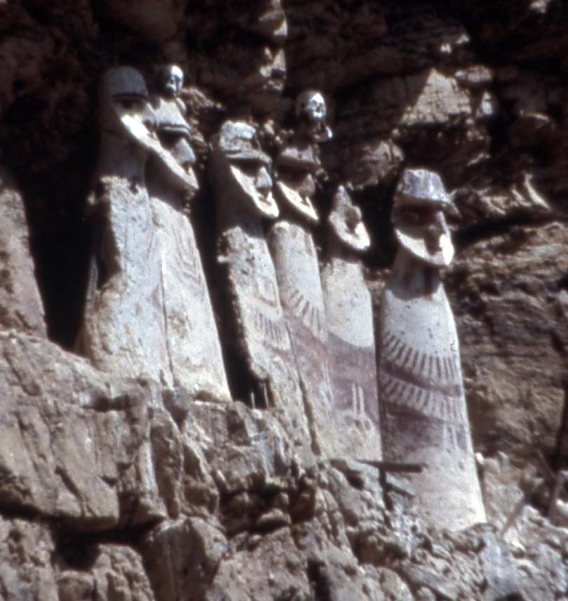 Die Sarkophage von Karajia